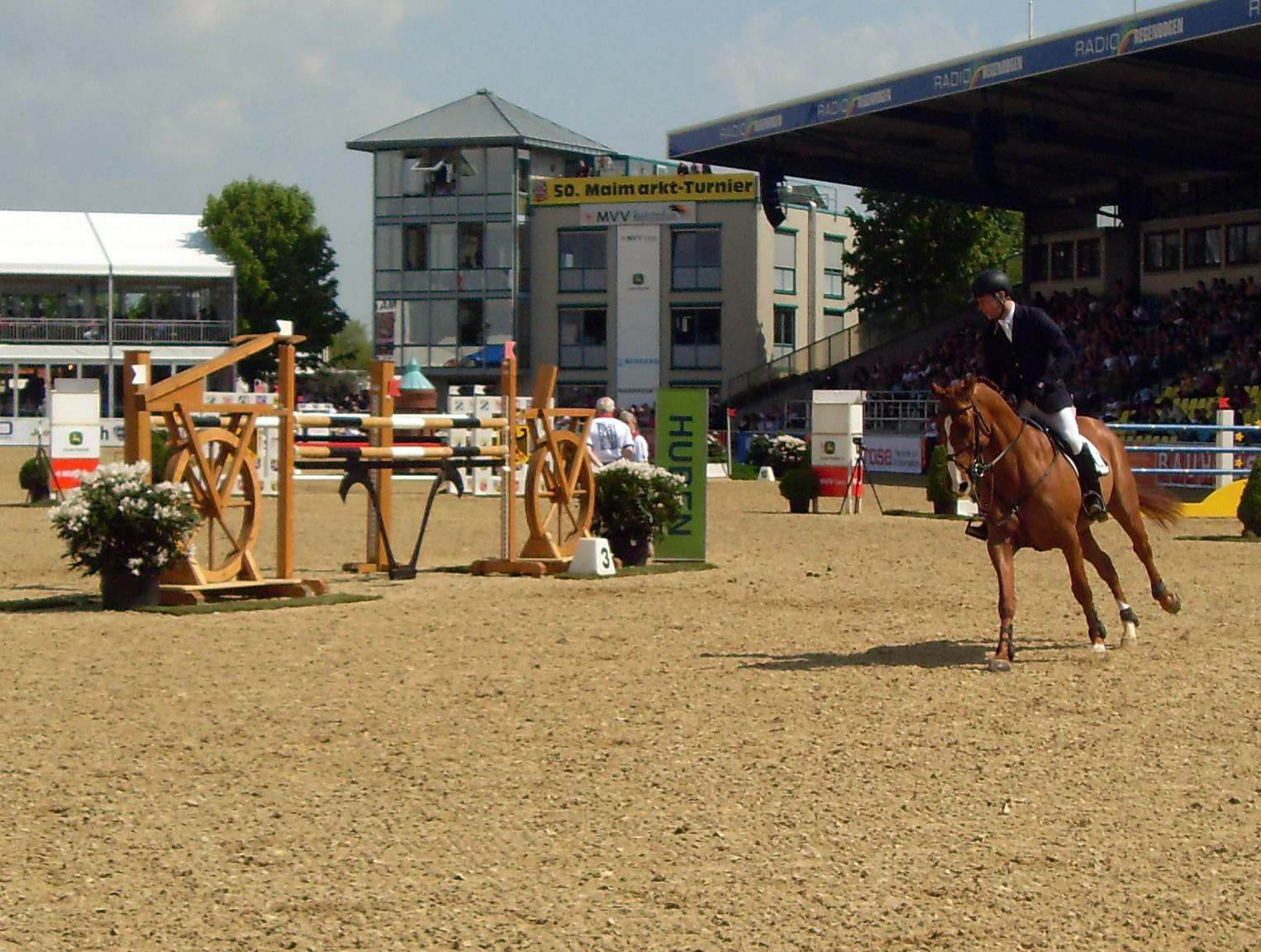 50. Maimarkt-Turnier, Johannes Ehning mit Salvador V